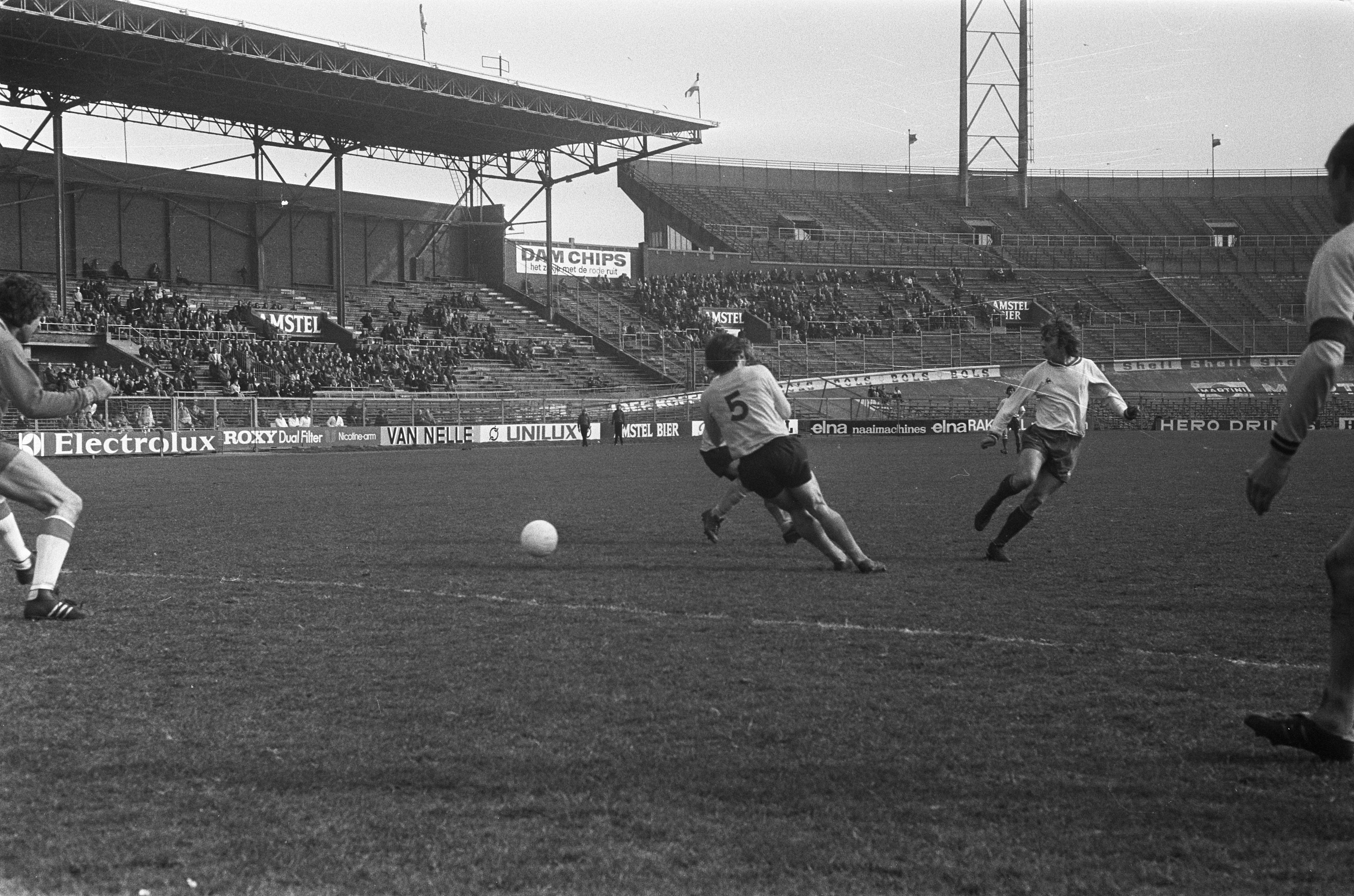 Collectie / Archief : Fotocollectie Anefo Reportage / Serie : FC Amsterdam tegen Roda: JC 2-0 Beschrijving : Van de Merkt (rechts) scoort eerste doelpunt Datum : 10 maart 1974 Locatie : Amsterdam, Noord-Holland Trefwoorden : voetbal Persoonsnaam : Merkt, Leen van de Instellingsnaam : FC Amsterdam, Roda JC Fotograaf : Rob Croes / Anefo Auteursrechthebbende : Nationaal Archief Materiaalsoort : Negatief (zwart/wit) Nummer archiefinventaris : bekijk toegang 2.24.01.05 Bestanddeelnummer : 927-0543